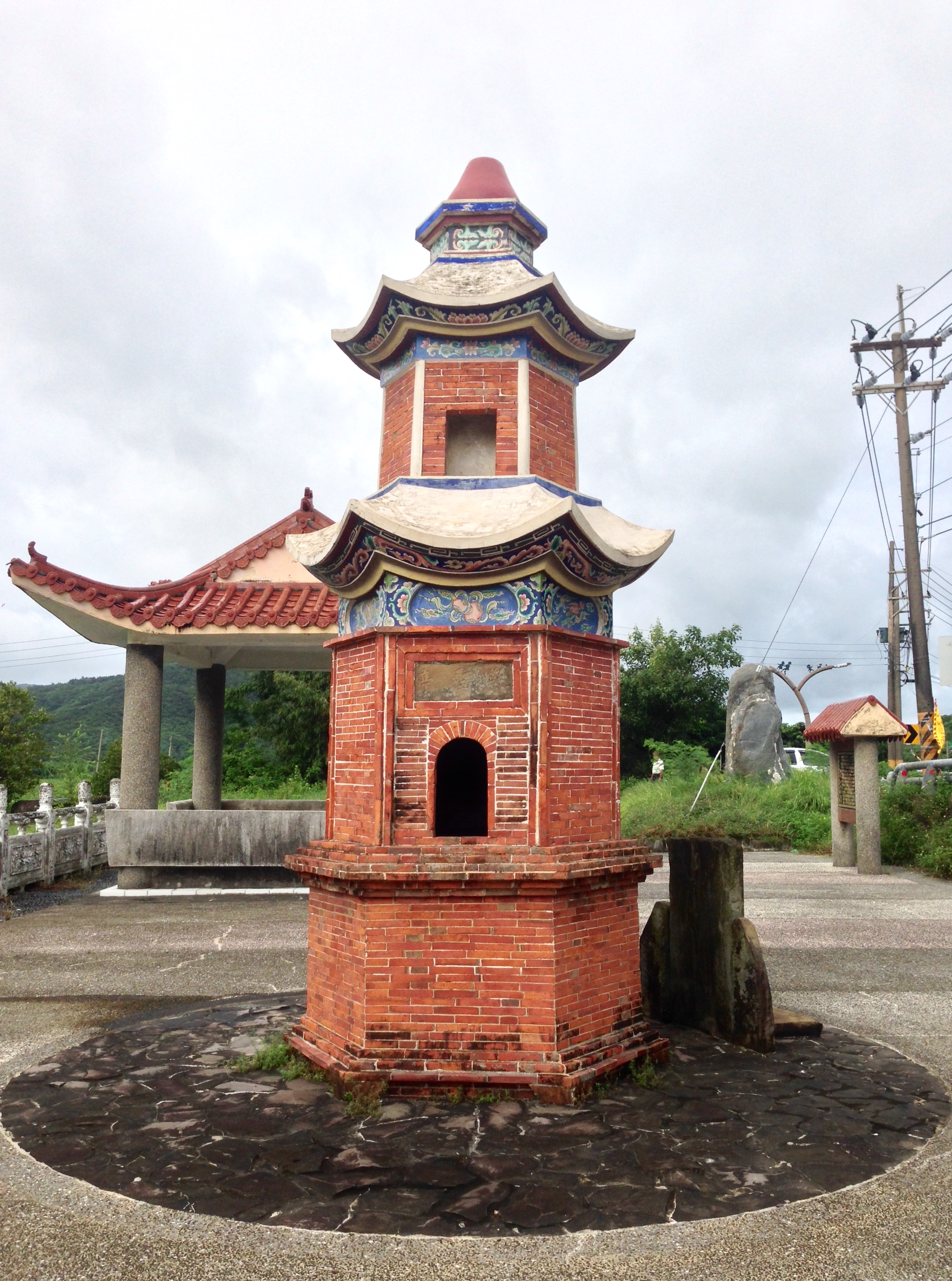 中文（台灣）: 滿洲鄉敬聖亭